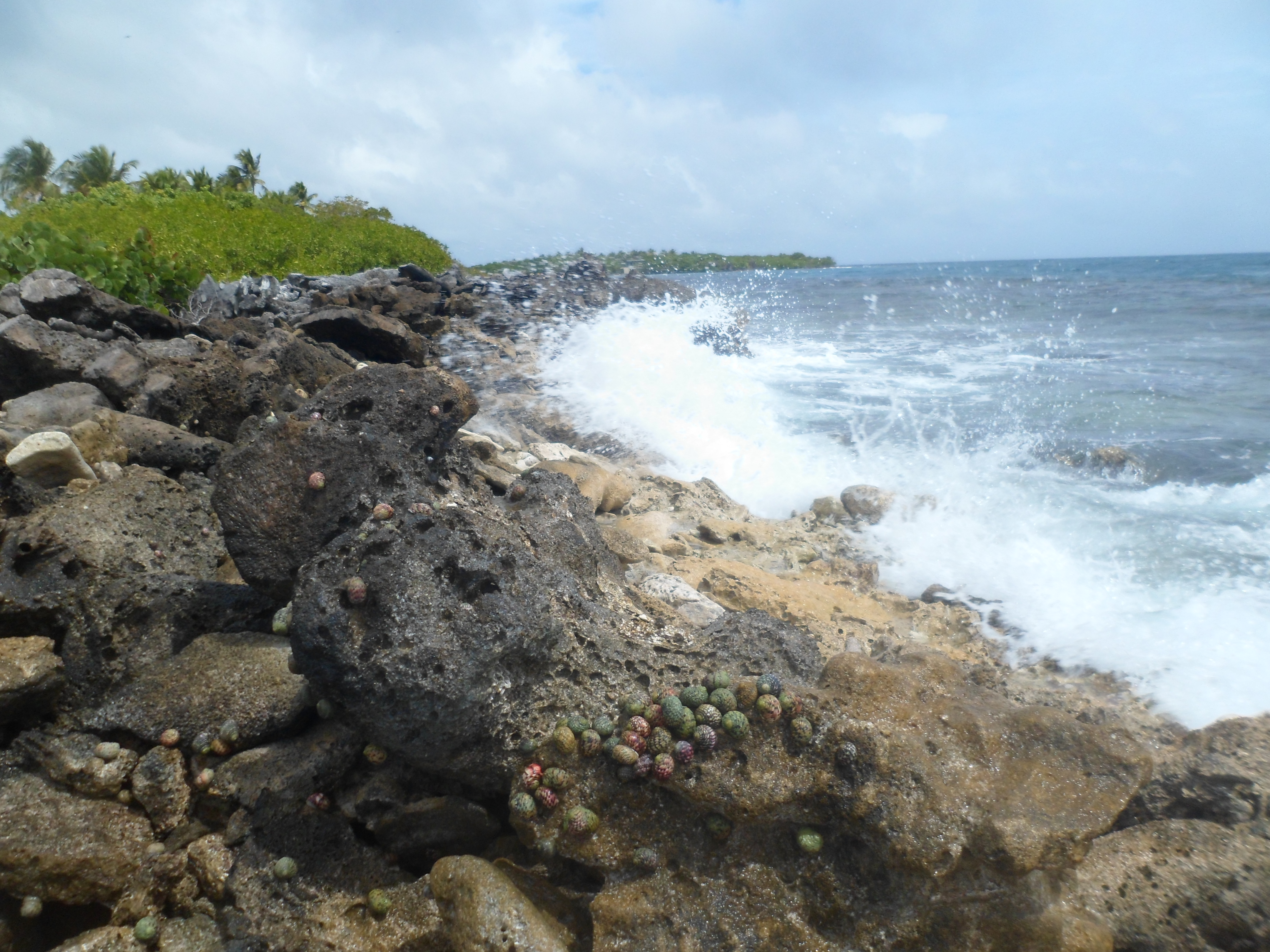 CARACOLES ESCONDIDOS DE LAS OLAS